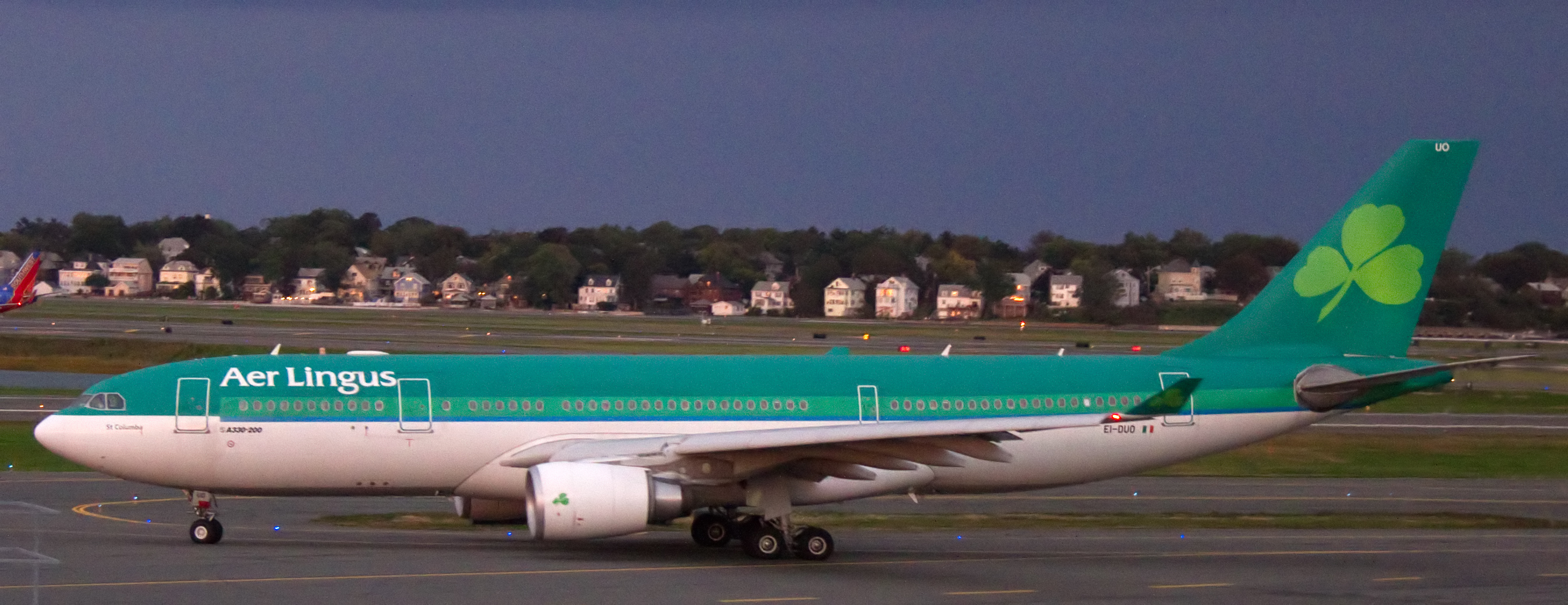 Aer Lingus A330-200 EI-DUO